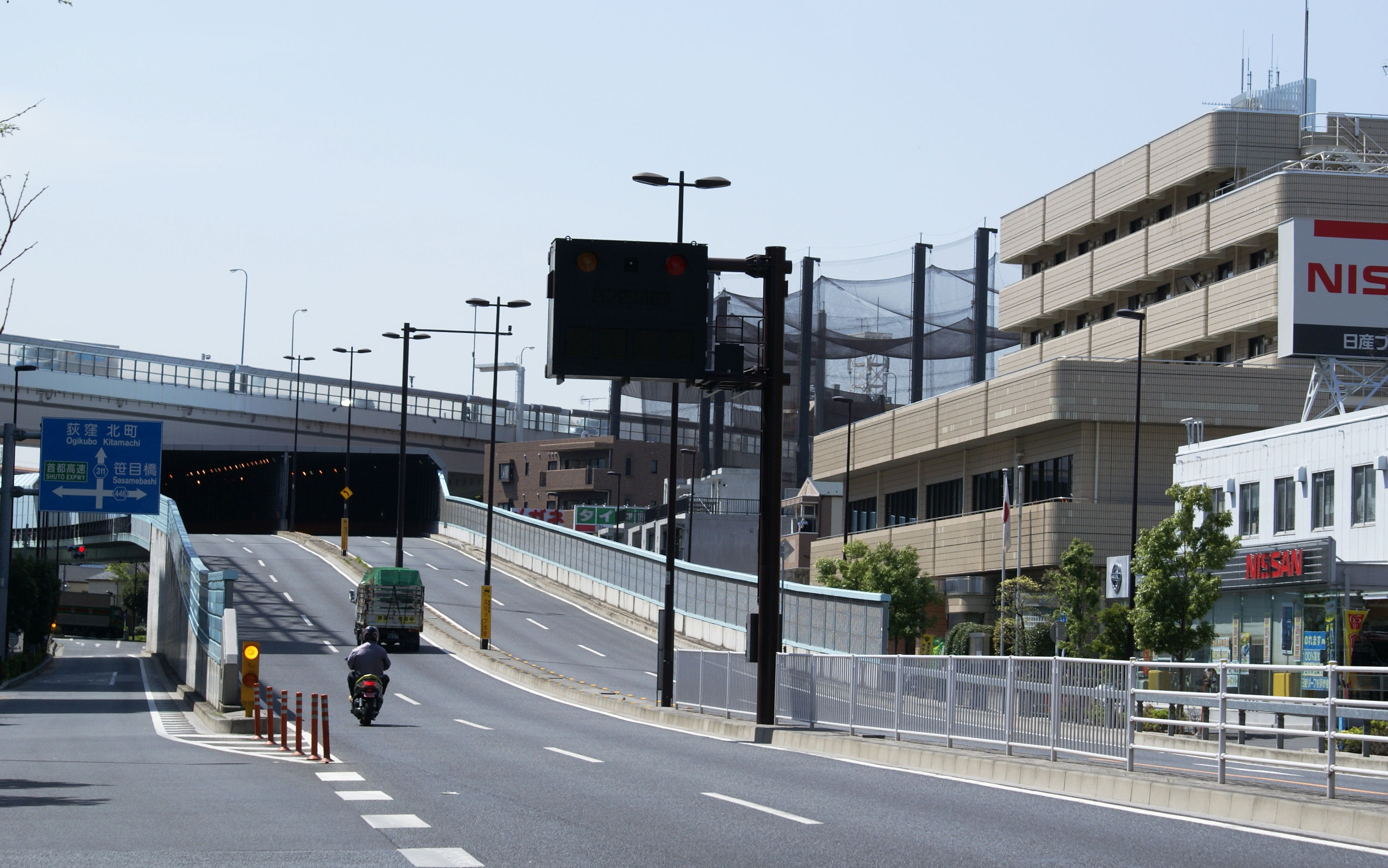 相生町環八通りと志村消防署